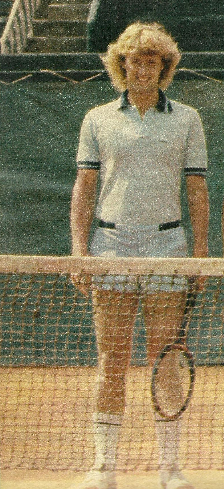 Eduardo Bengoechea, tenista argentino, activo en las décadas de 1970-80.